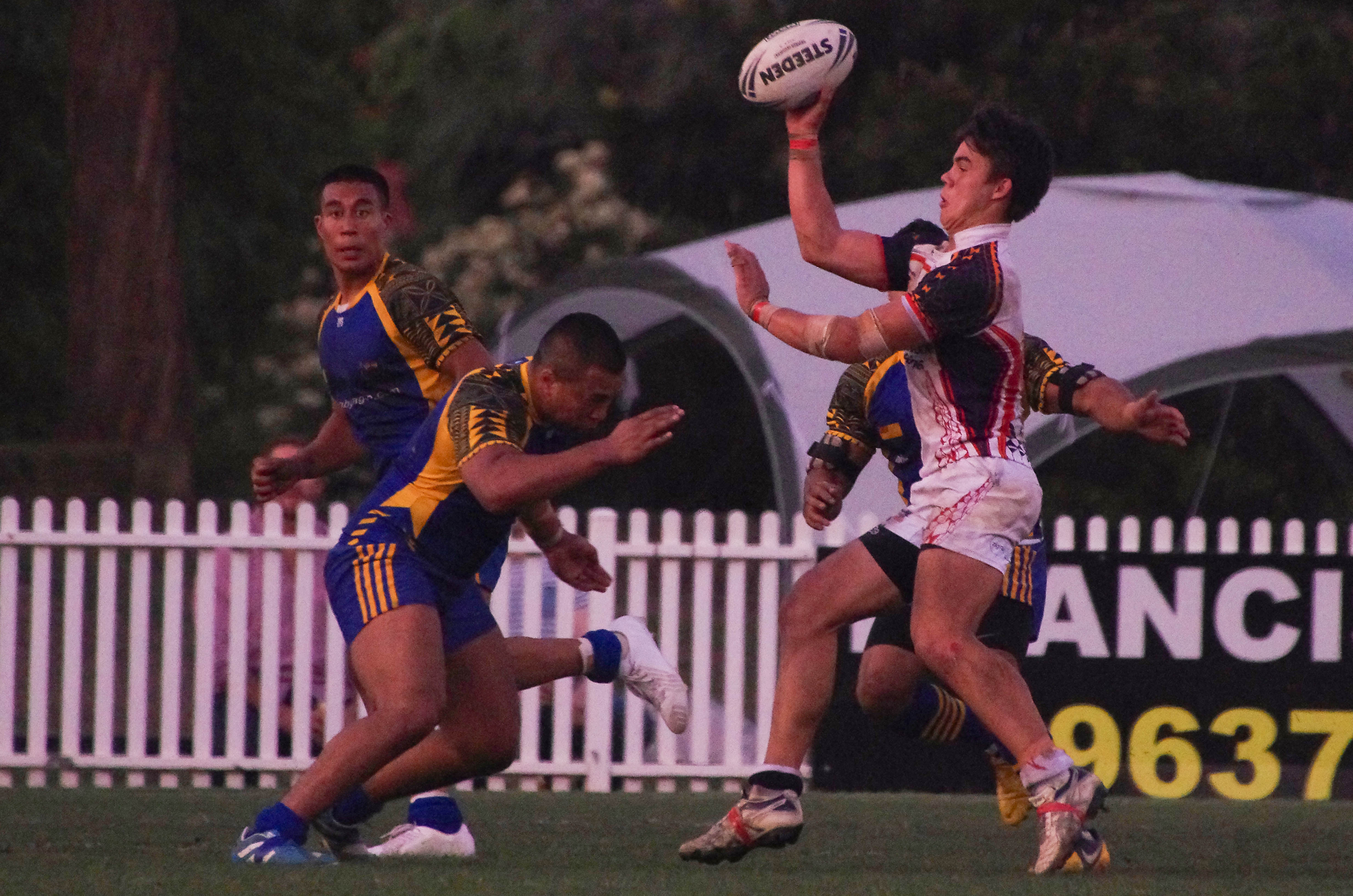 NIUE v PHILIPPINES INTERNATIONAL RL TEST 2014